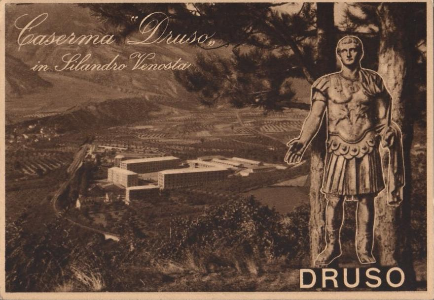 La caserma Druso in una cartolina degli anni '30